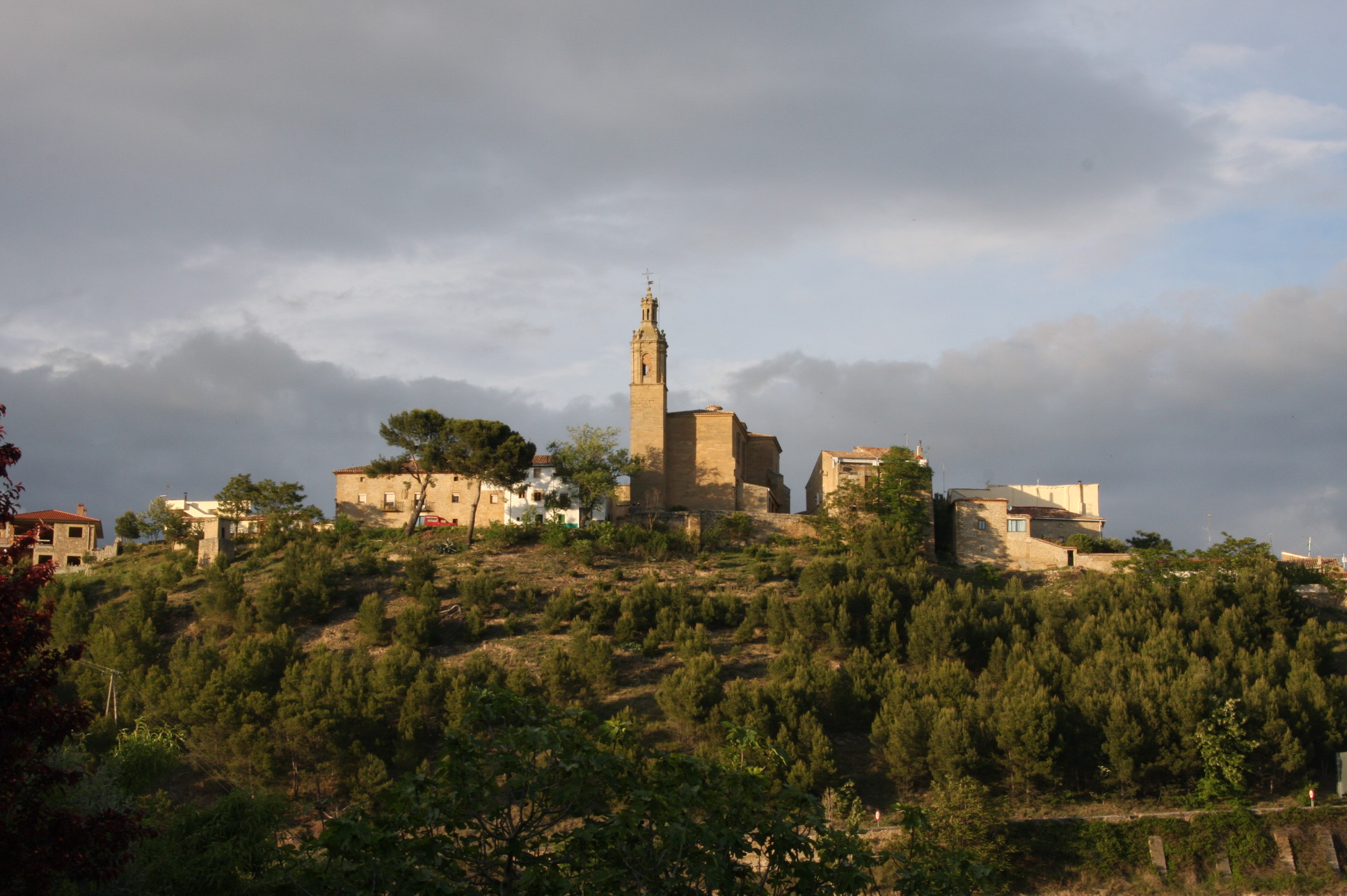 Sansol